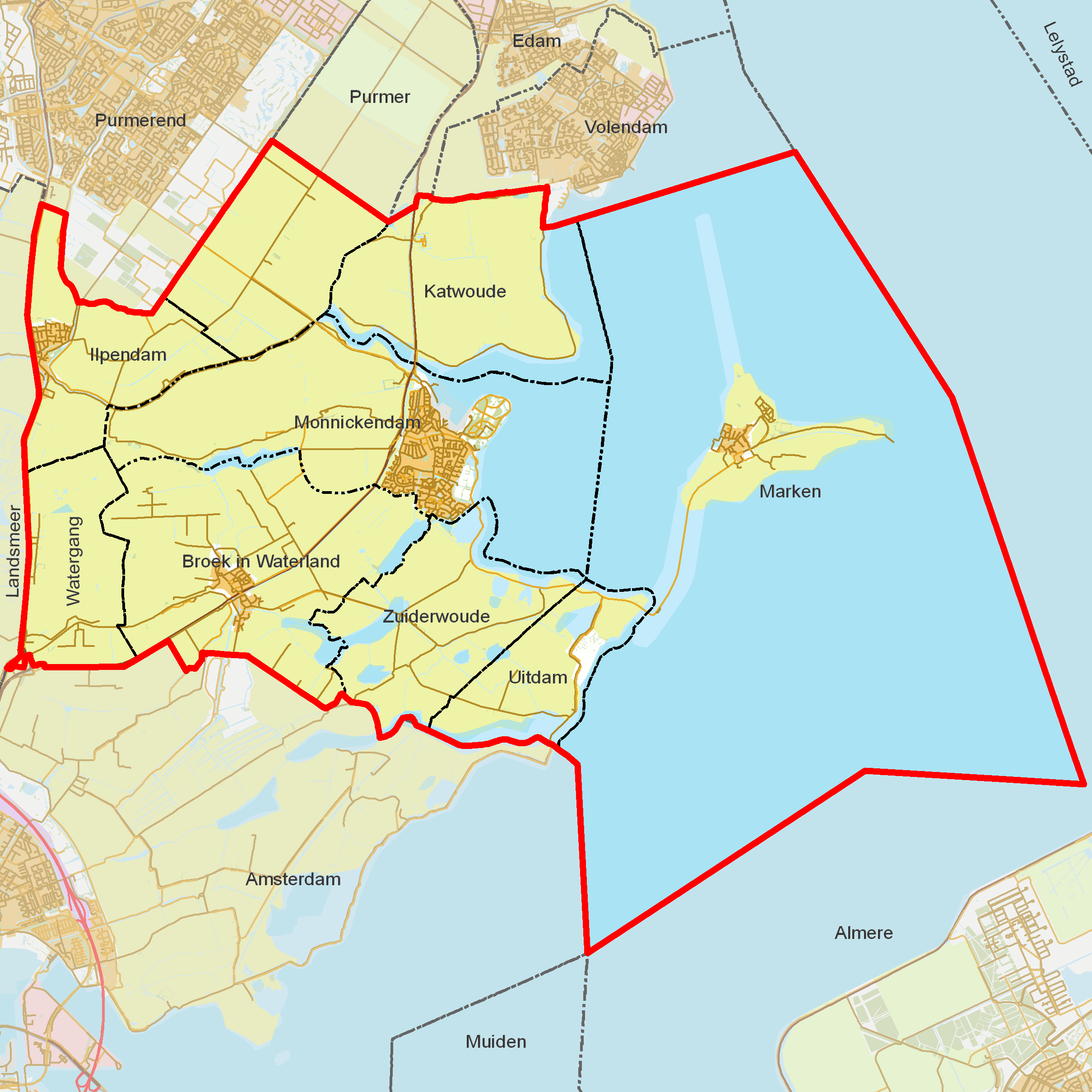 BAG woonplaatsen - Gemeente Waterland.png